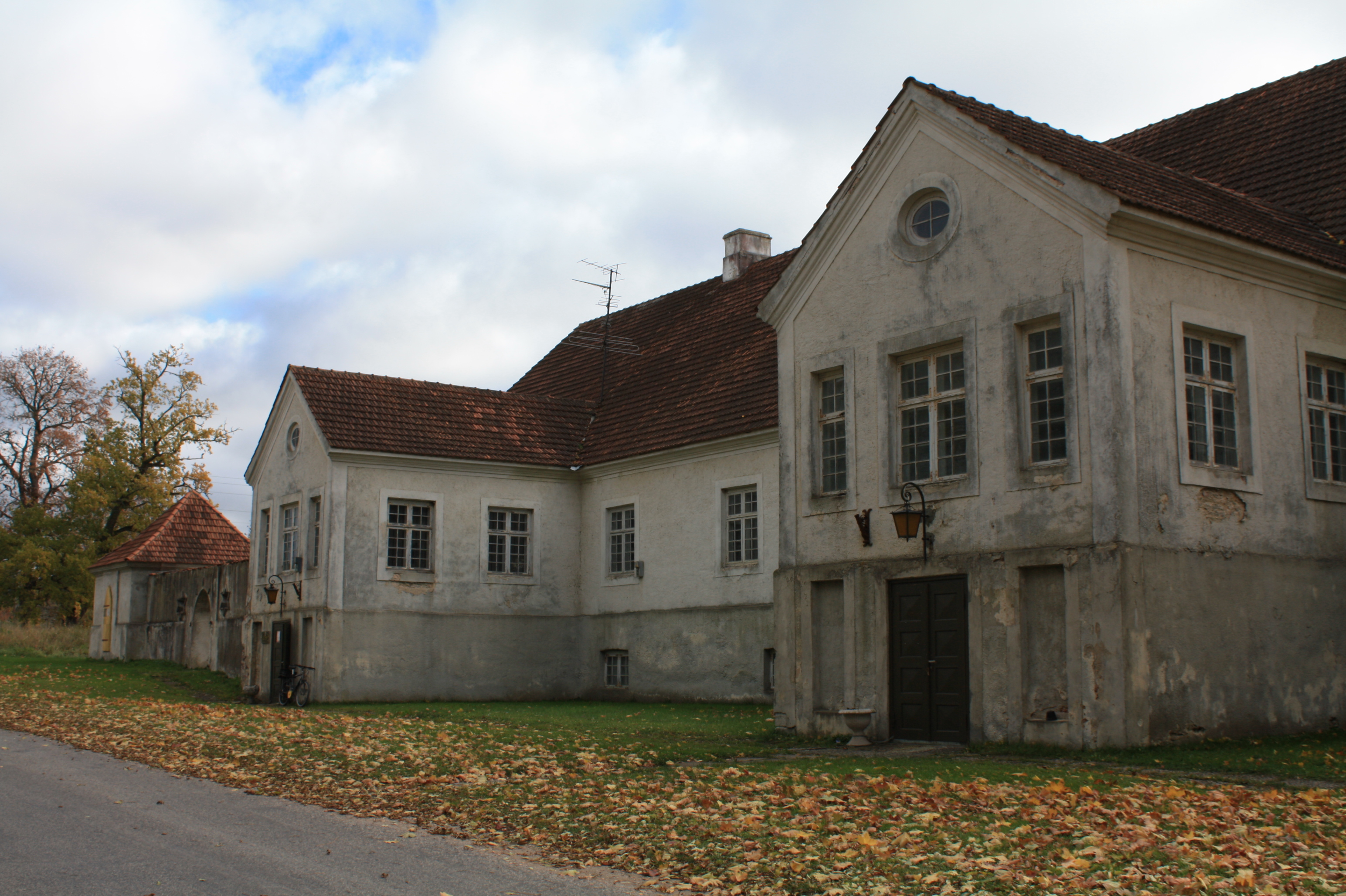 Kolga mõisa valitsejamaja